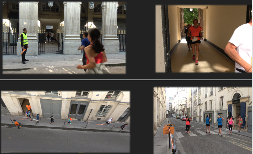 Des Jardin du Palais Royal au Passage Potier évènement Run City 2018